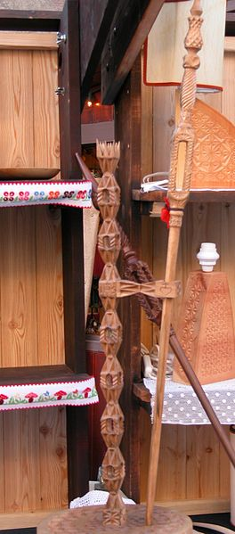 quenouille